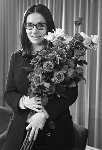 ana Mouskouri op Schiphol in 1969